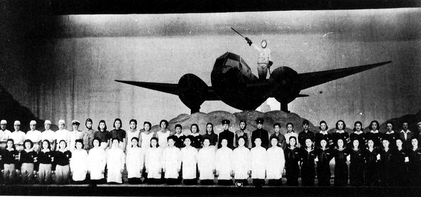 雪組「翼の決戦」。上：春日野八千代(Kasugano Yachiyo)。この公演をもって宝塚大劇場は閉鎖し、海軍に接収された。